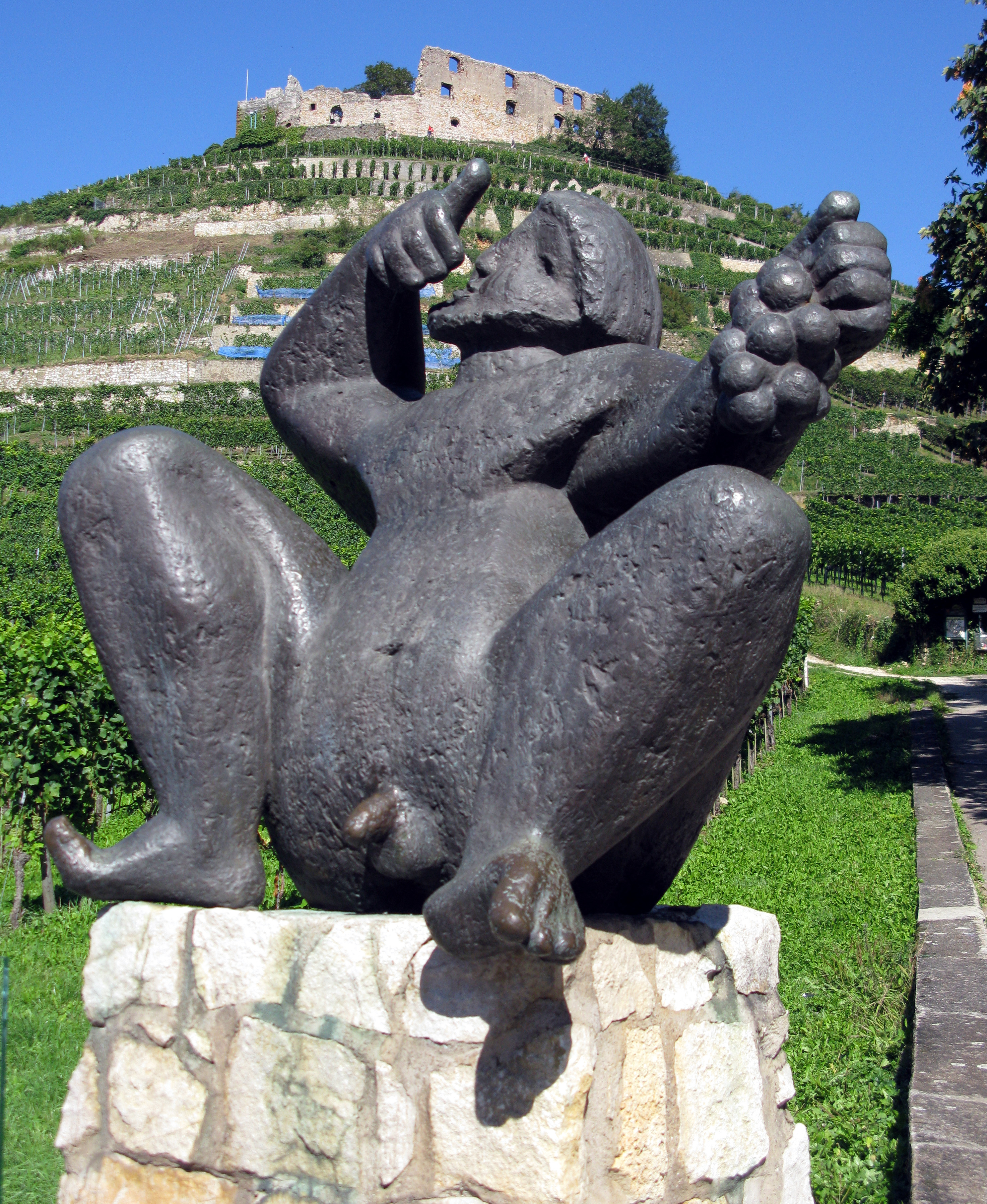 Bacchus von Kurt Lehmann, 1970, Bronze in Staufen